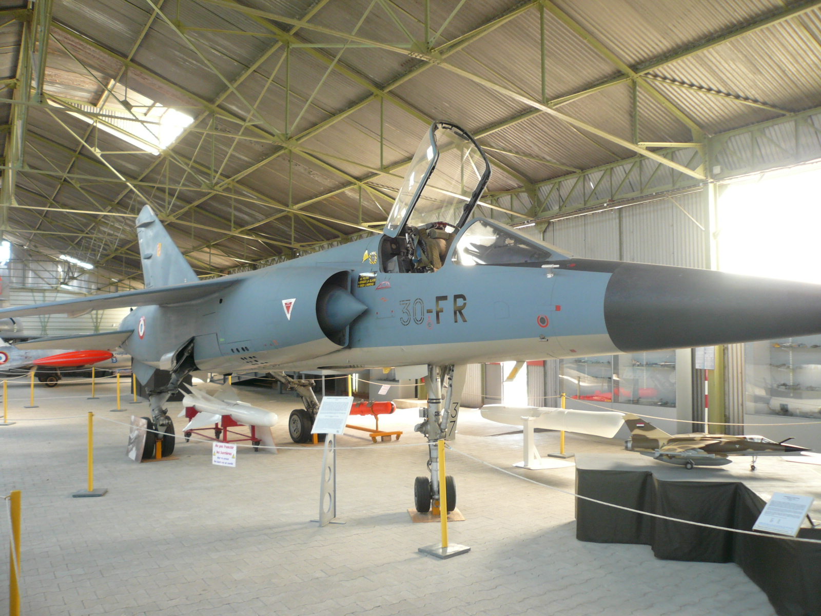 Mirage F1 MEAC